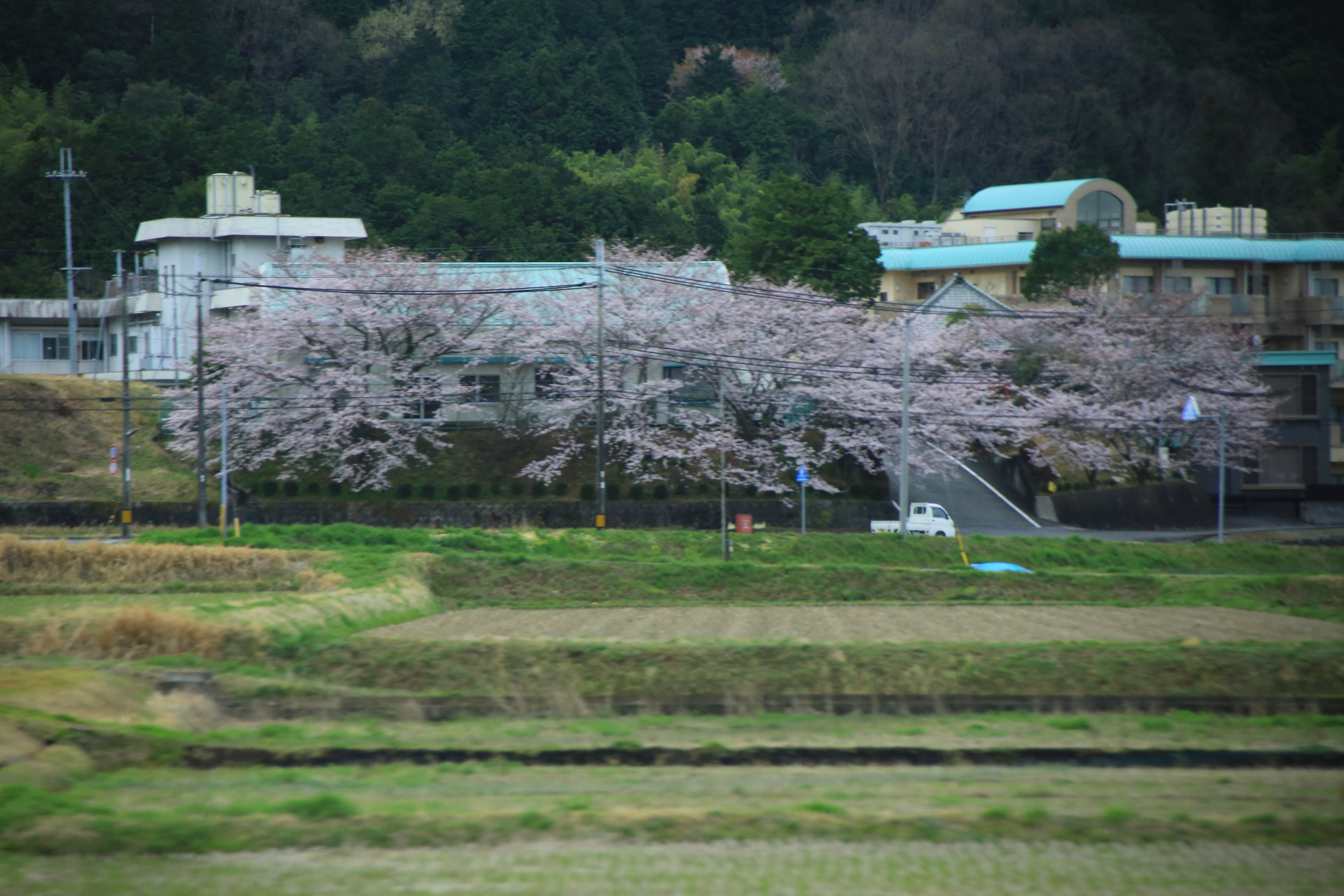 宮津-姬路 姫路城途中 Miyazu-Himeji